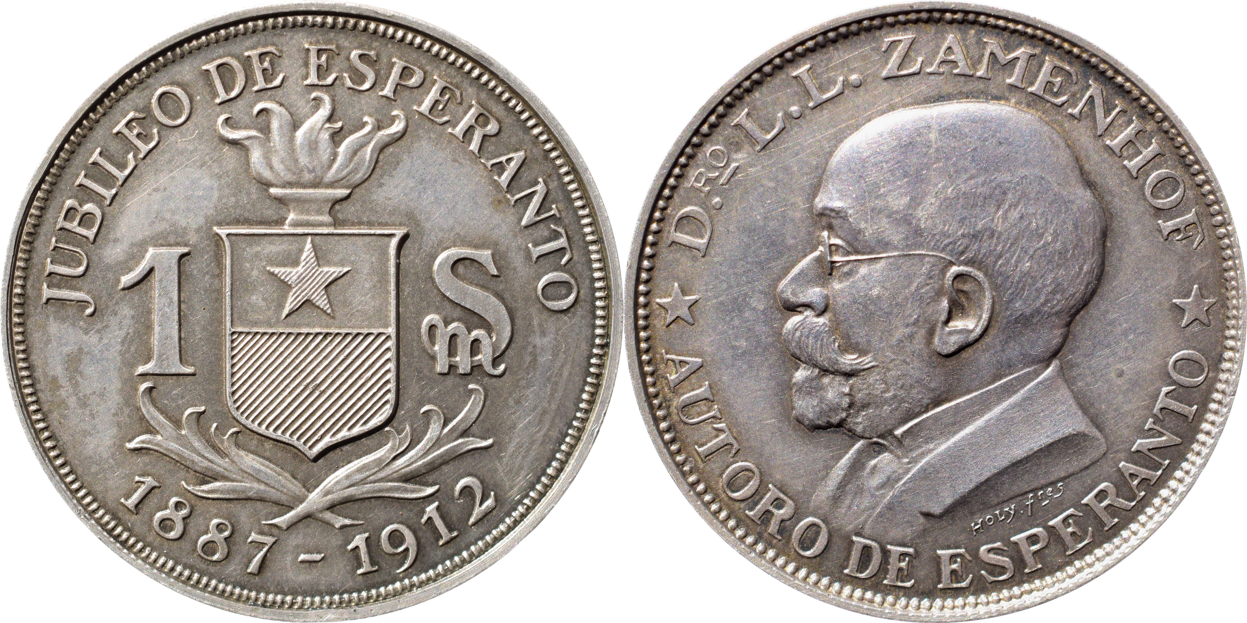 Monero de 1 spesmilo.